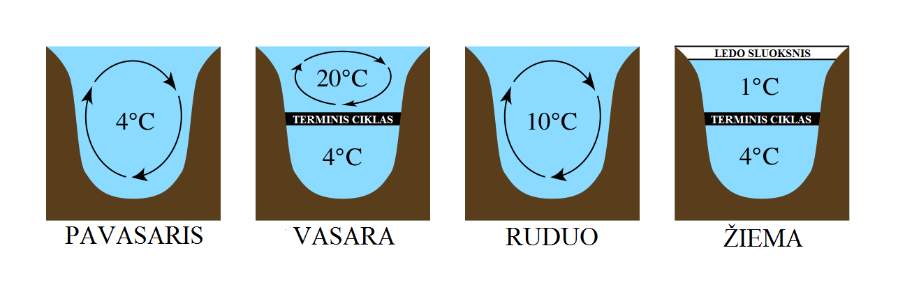 Terminė ežerų stratifikacija